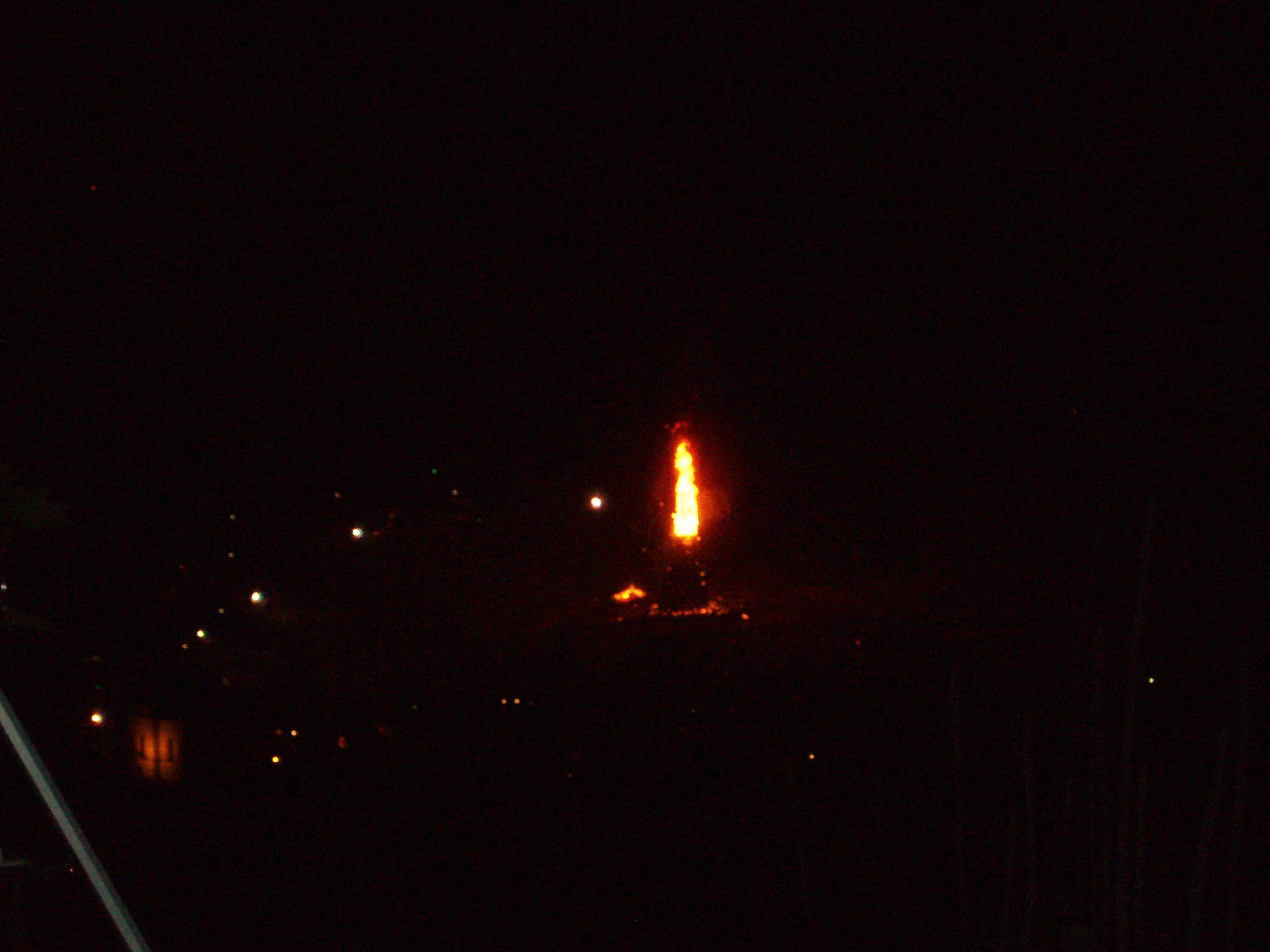 Pogled na kres iz Zajčje Gore 17. Februarja 2006